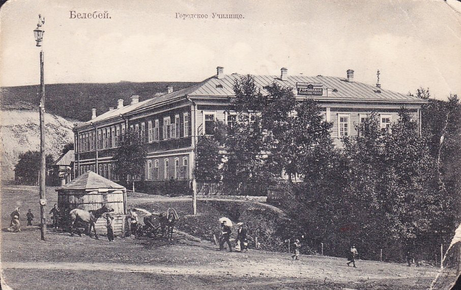 Башкортостан. Бирск. Белебей. Городское училище.